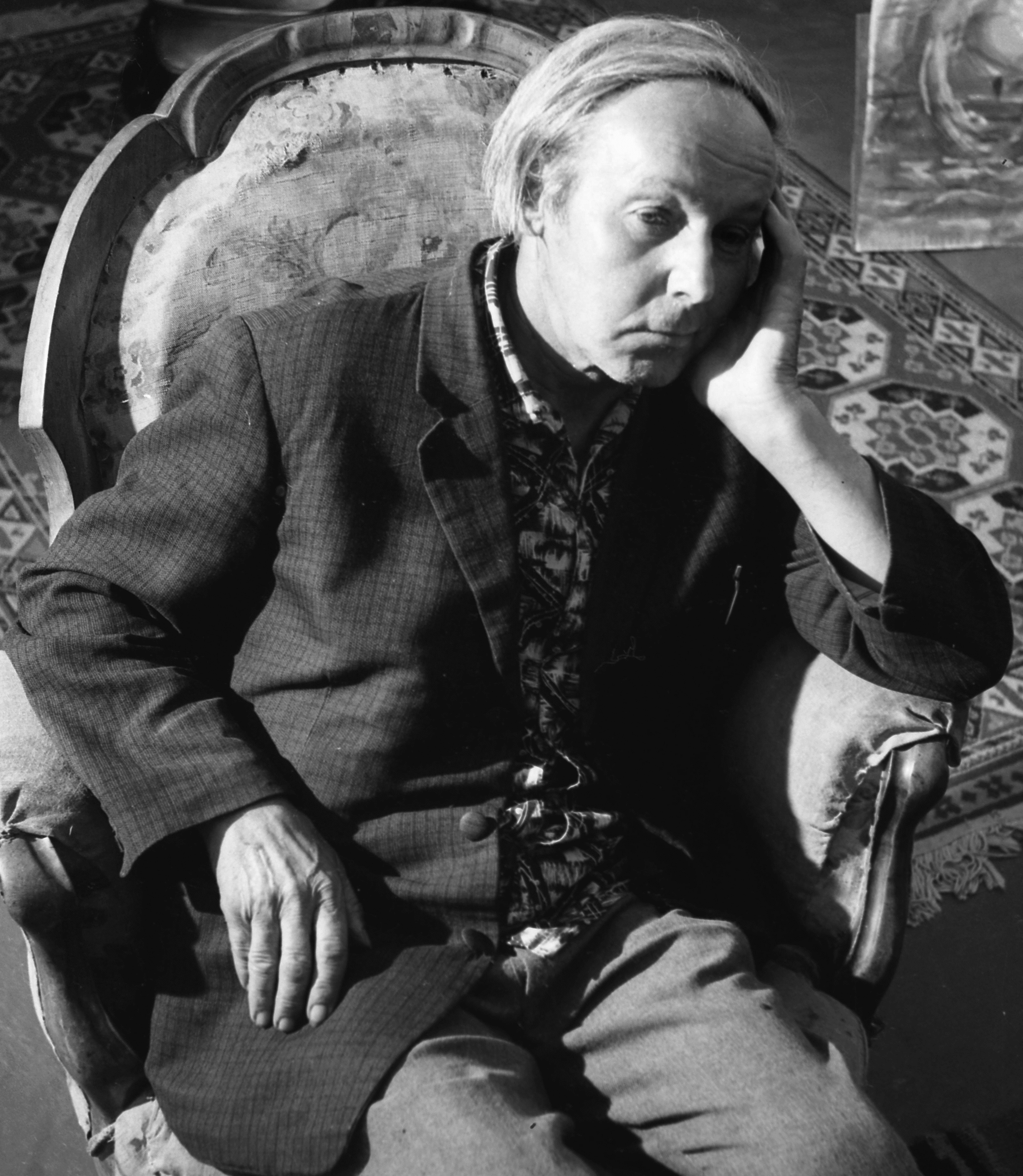 Szentendre. Új Művésztelep, Pirk János festőművész.